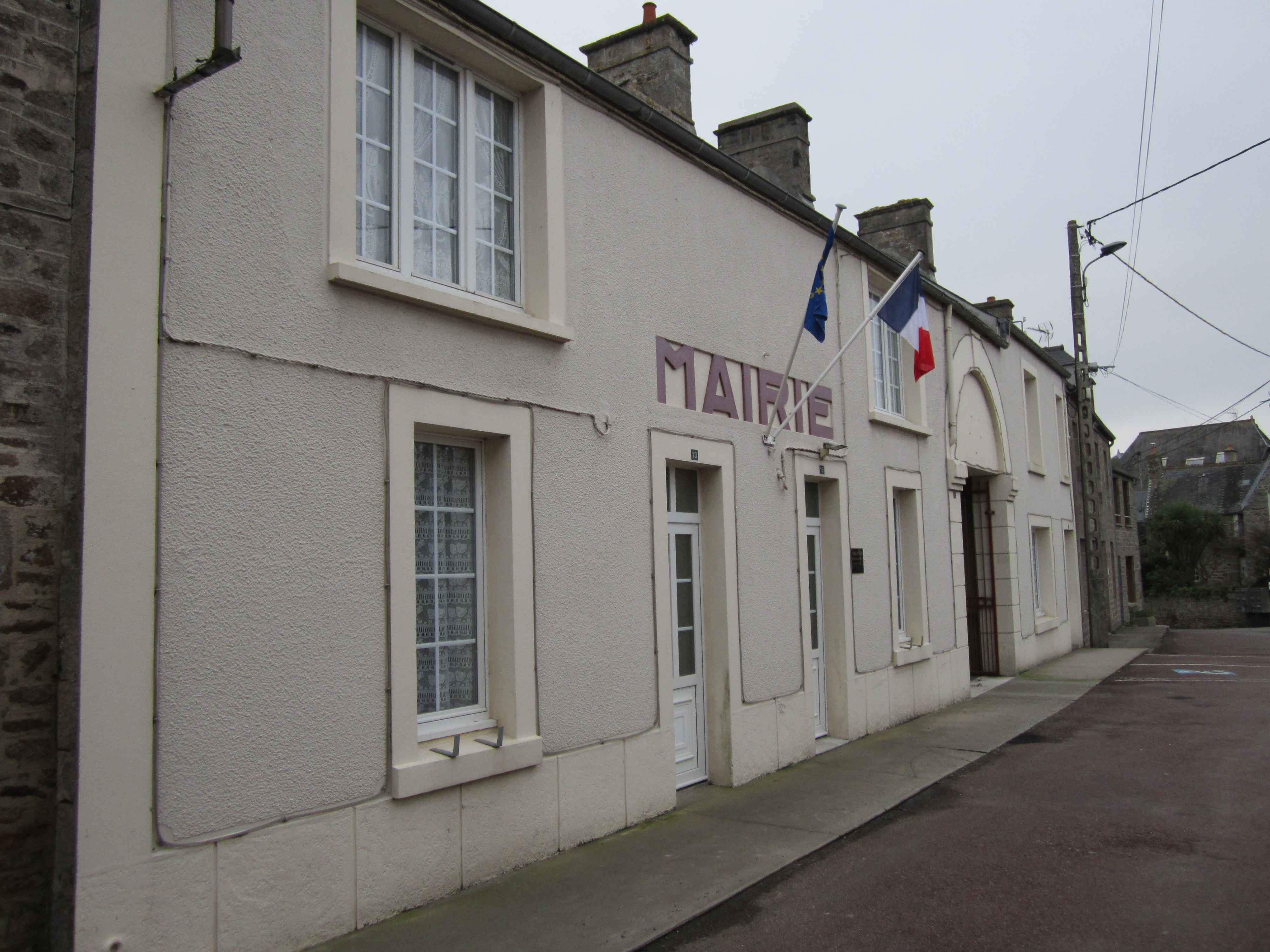 église Saint-Léger d'Anneville-en-Saire